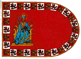 Pendón de la ciudad de Sevilla